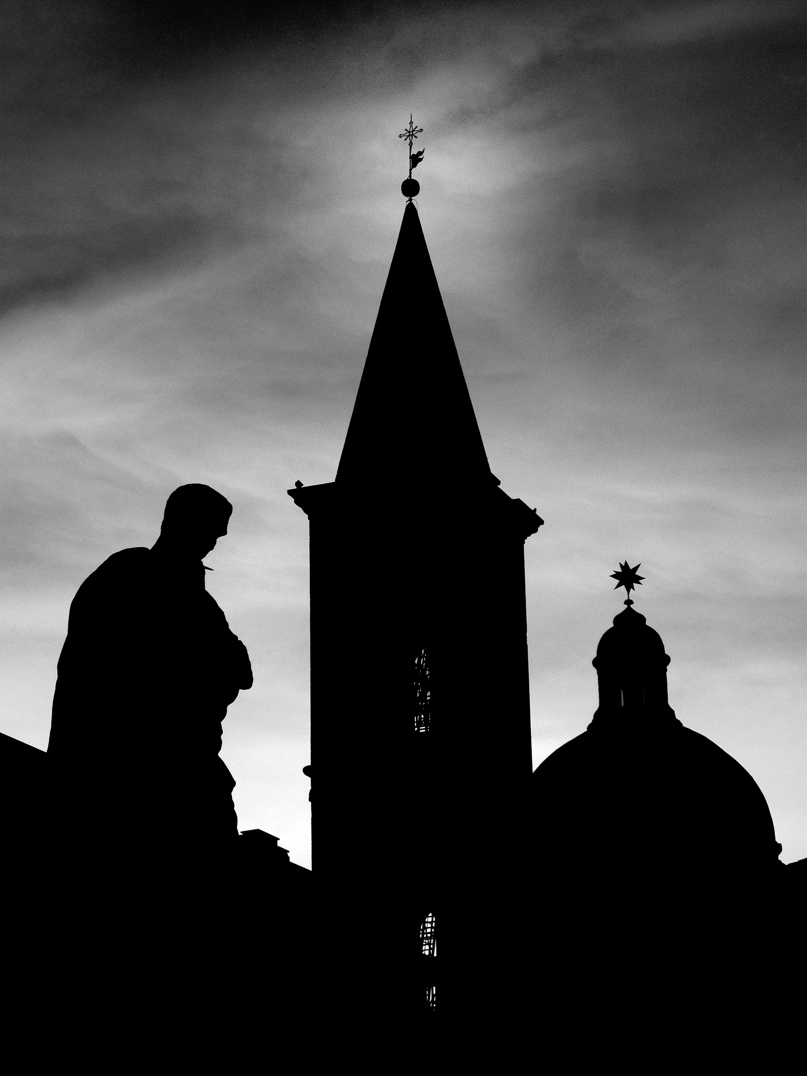 Immagine di Marco Fodde